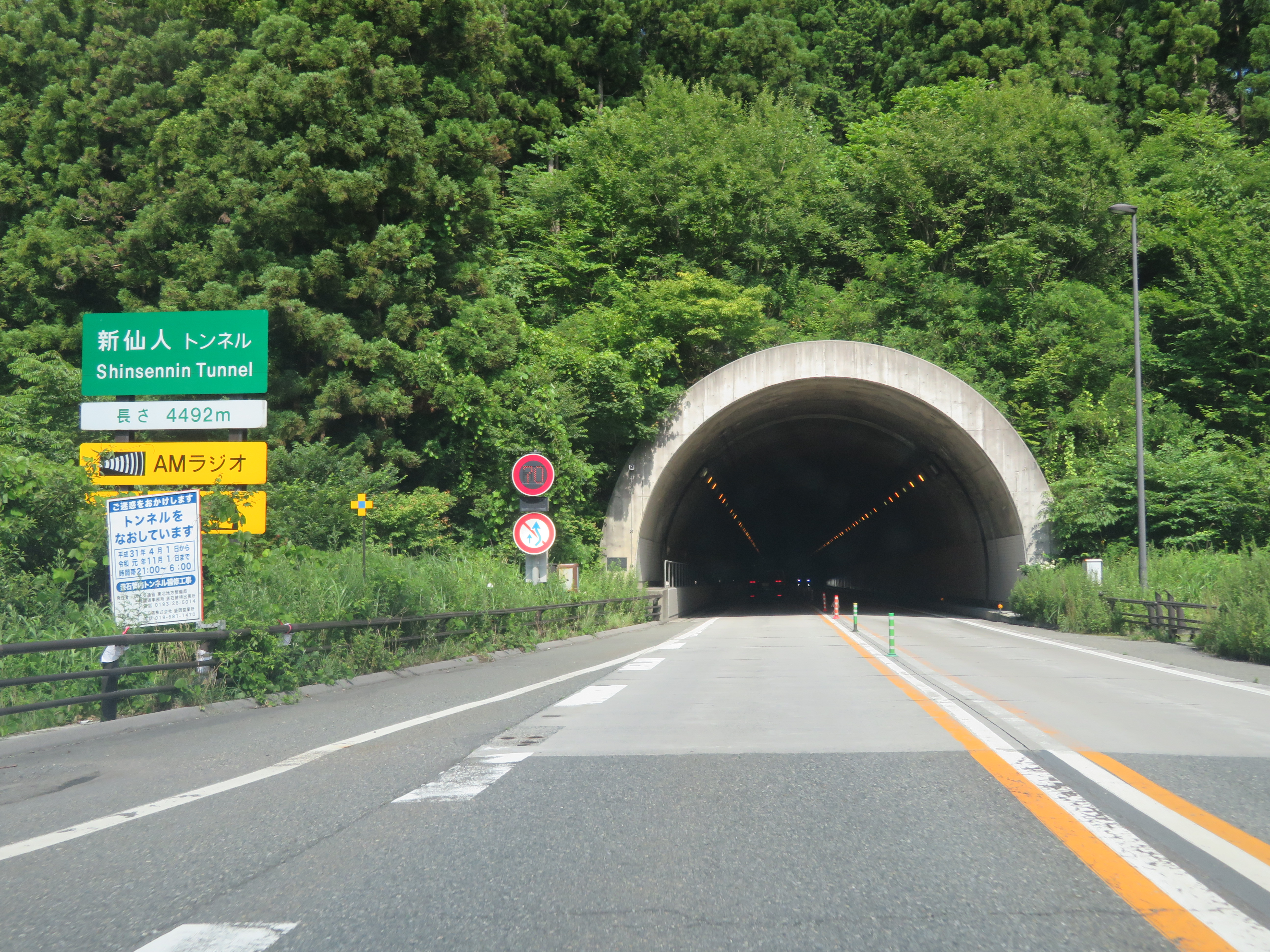 釜石自動車道 新仙人トンネル（遠野住田ＩＣ側坑口から撮影）